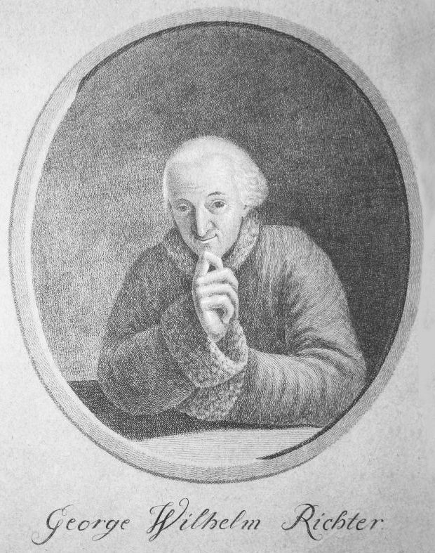 Porträt George Wilhem Richter, Kupferstich von Johann Heinrich Wiese (1748–1803)